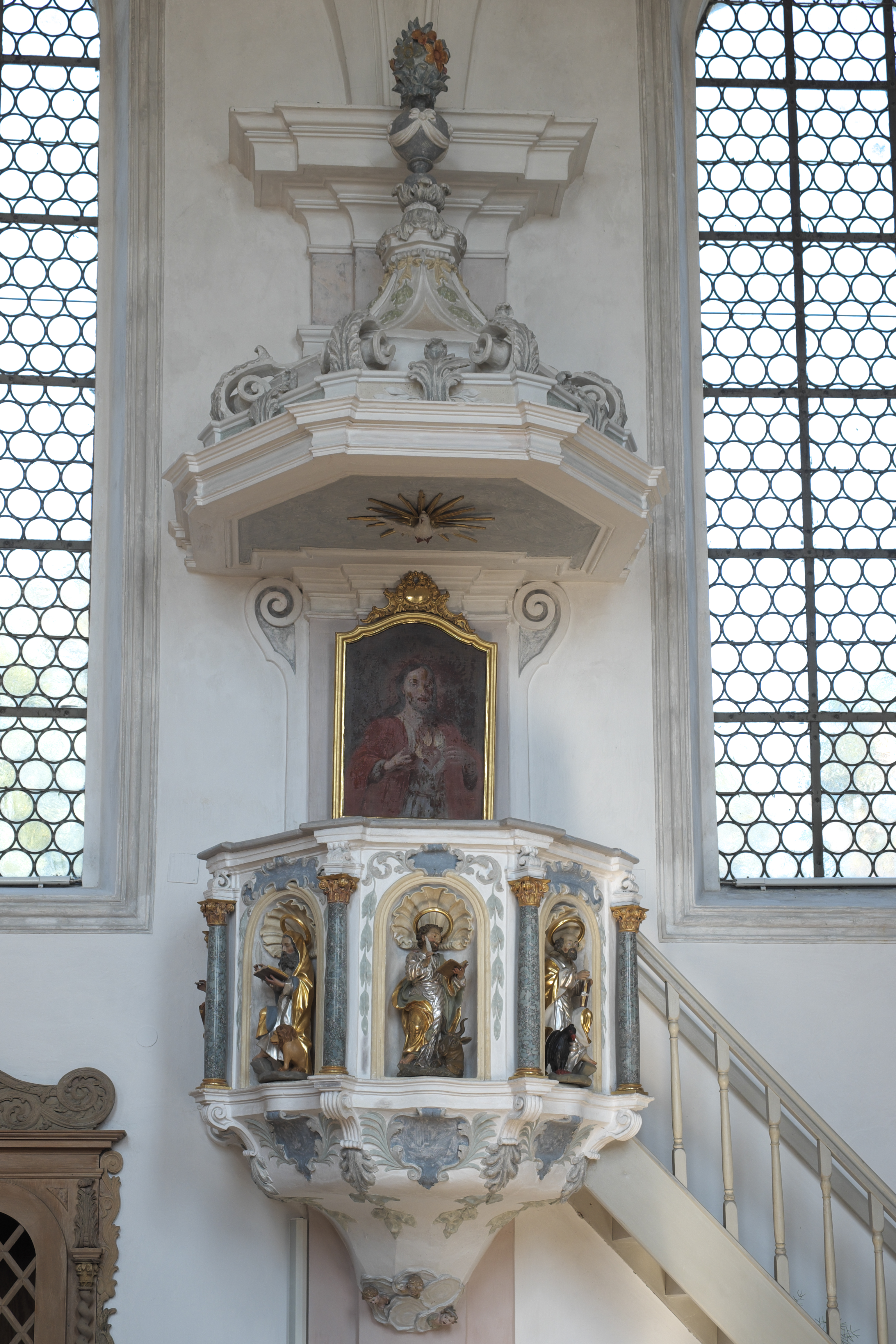 Katholische Pfarrkirche Mariä Himmelfahrt in Epfenhausen (Penzing) im Landkreis Landsberg am Lech (Bayern/Deutschland), Kanzel